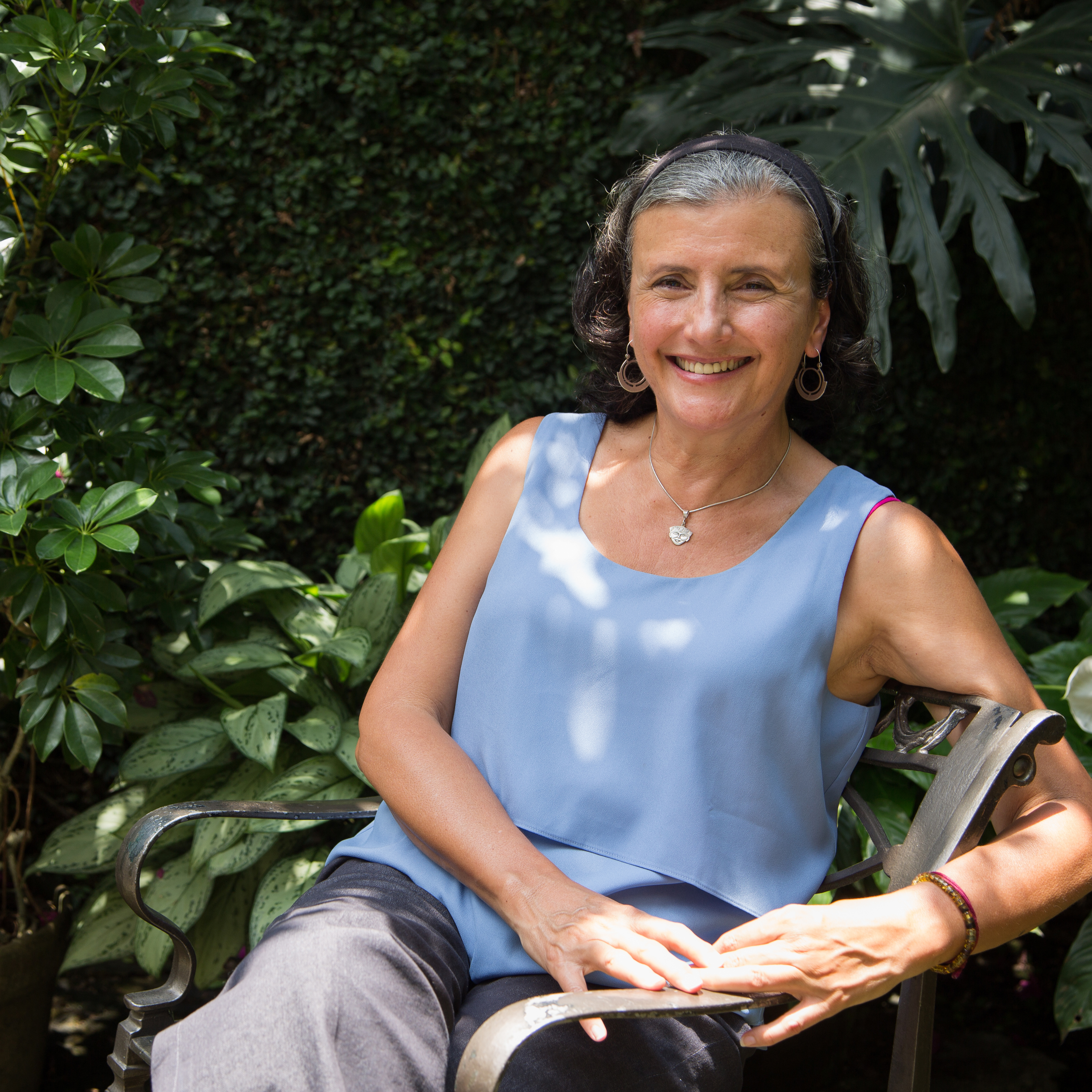 Guadalupe Sánchez directora del documental "La primera sonrisa". Hotel Mesón del Alférez, Xalapa, Veracruz. 30 mayo del 2016. Foto: Delia Martínez / Festival Ambulante.